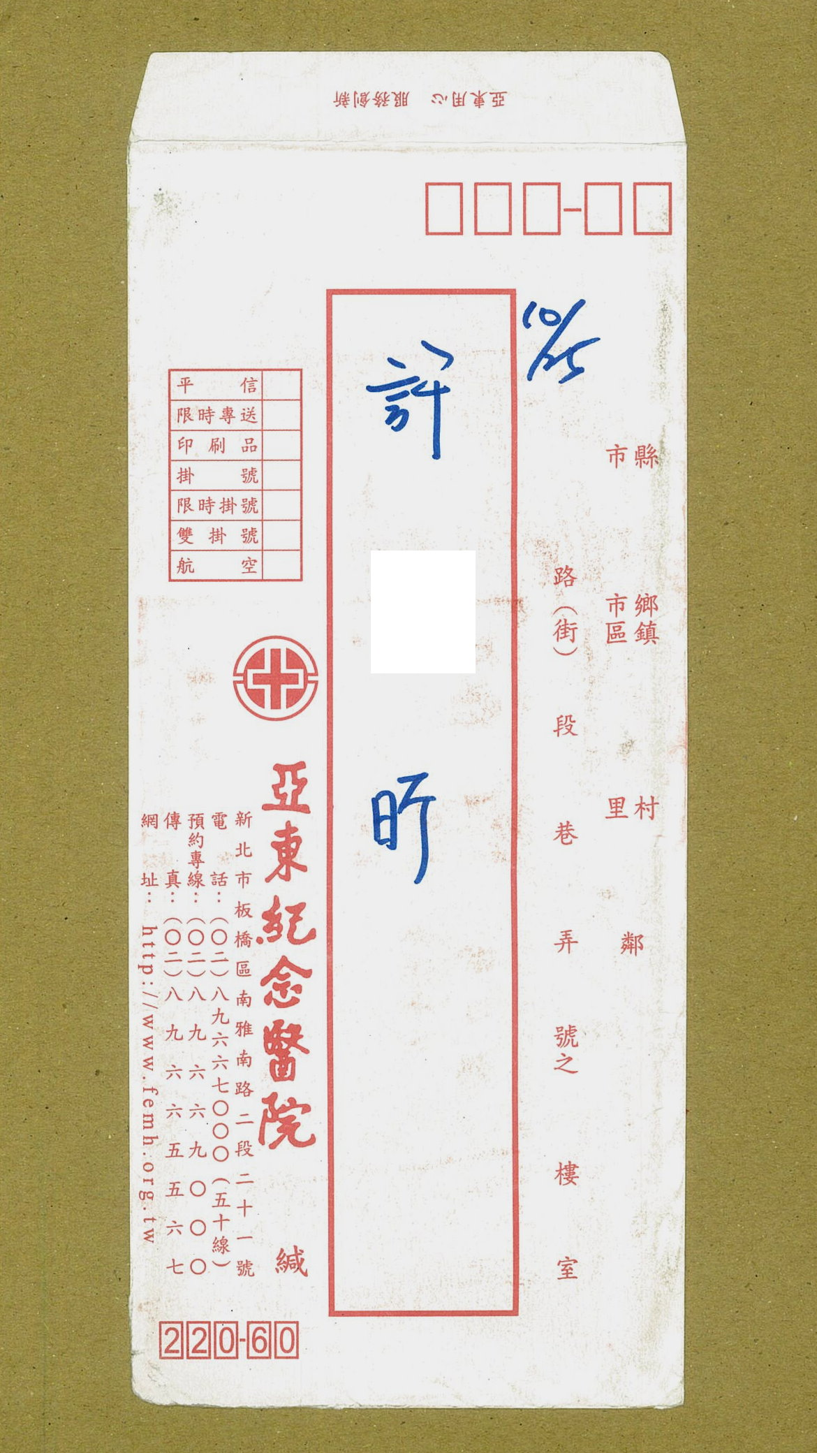 亞東紀念醫院信封。